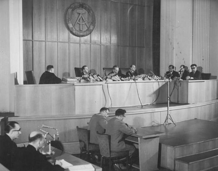 Oberstes Gericht, Globke-Prozess, Richterbank Zentralbild Stöhr-9.7.1963 2. Tag im Globke-Prozeß. Der 1. Strafsenat des Obersten Gerichts der DDR setzte am Vormittag des 9. Juli 1963 die Verhandlungen gegen den des millionenfachen Mordes Angeklagten Staatssekretär des Bonner Bundeskanzleramtes, Dr. Globke fort. UBz: Blick auf das hohe Gericht.